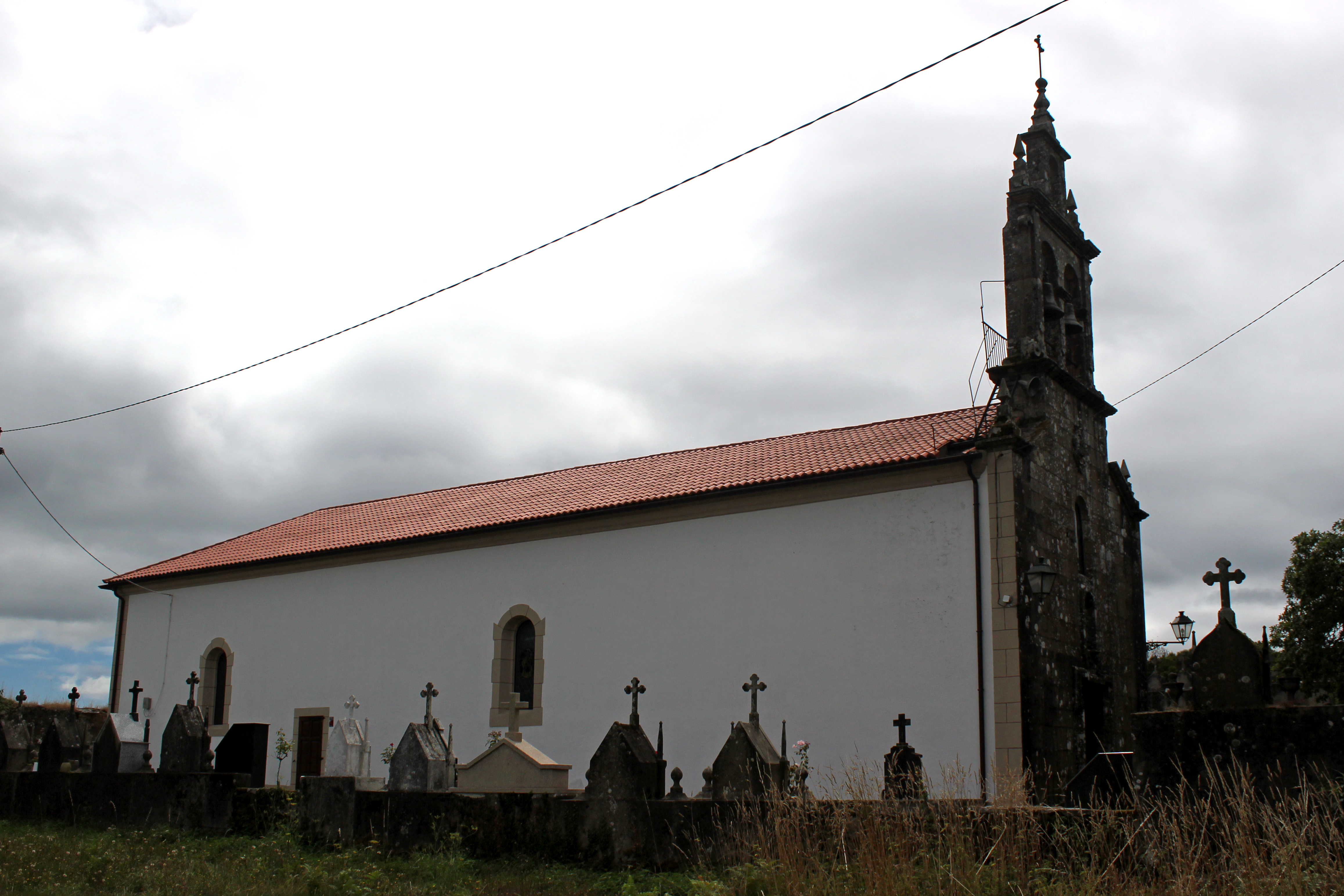 Igrexa da Enfesta, Santiago de Compostela.